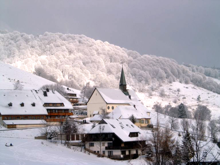 GNU-FDL Foto Meroth Hofsgrund, Schauinsland aufgenommen am 3. Januar 2004 12:07